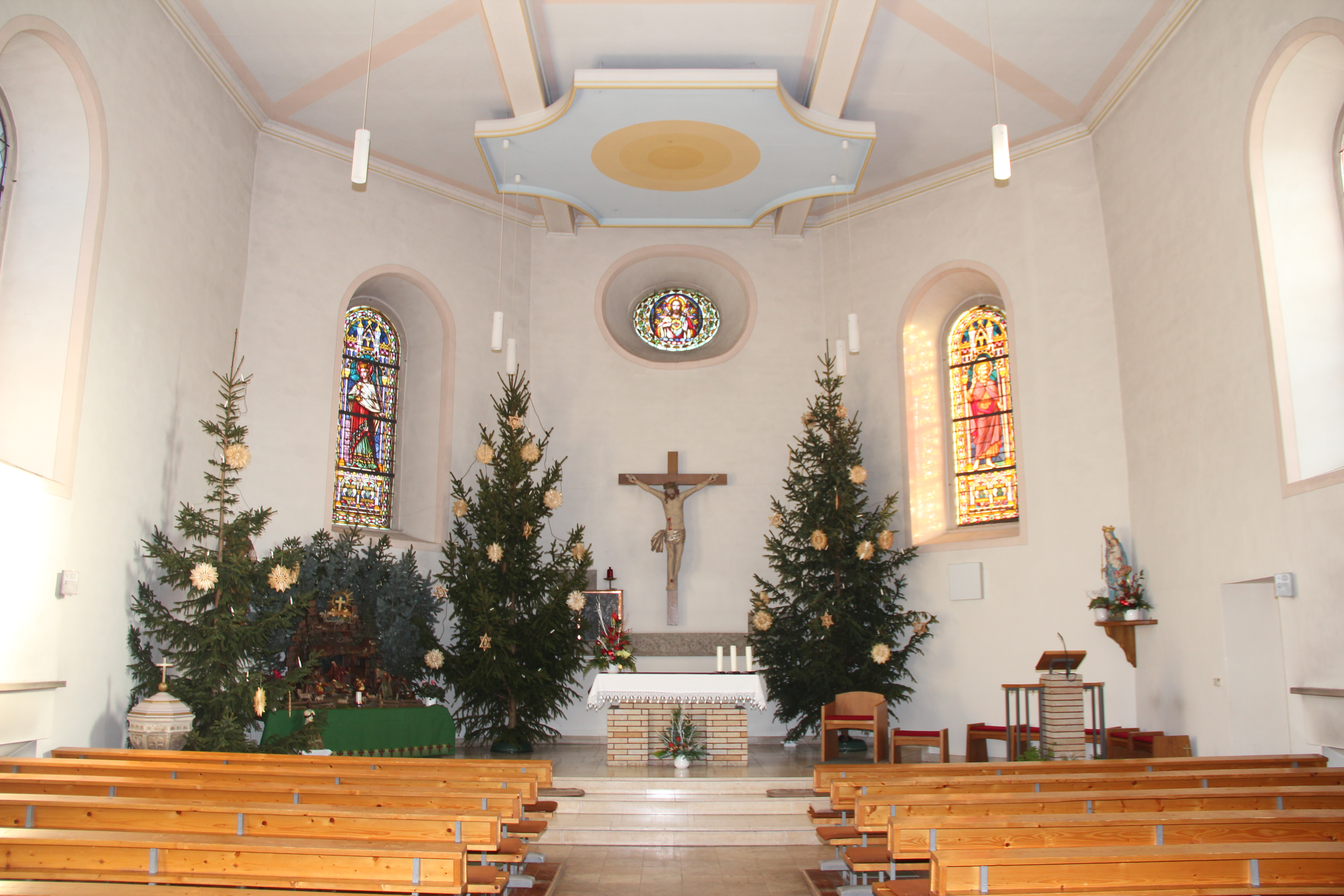 Innenansicht der St. Pankratius Kirche in Westhausen im Eichsfeld